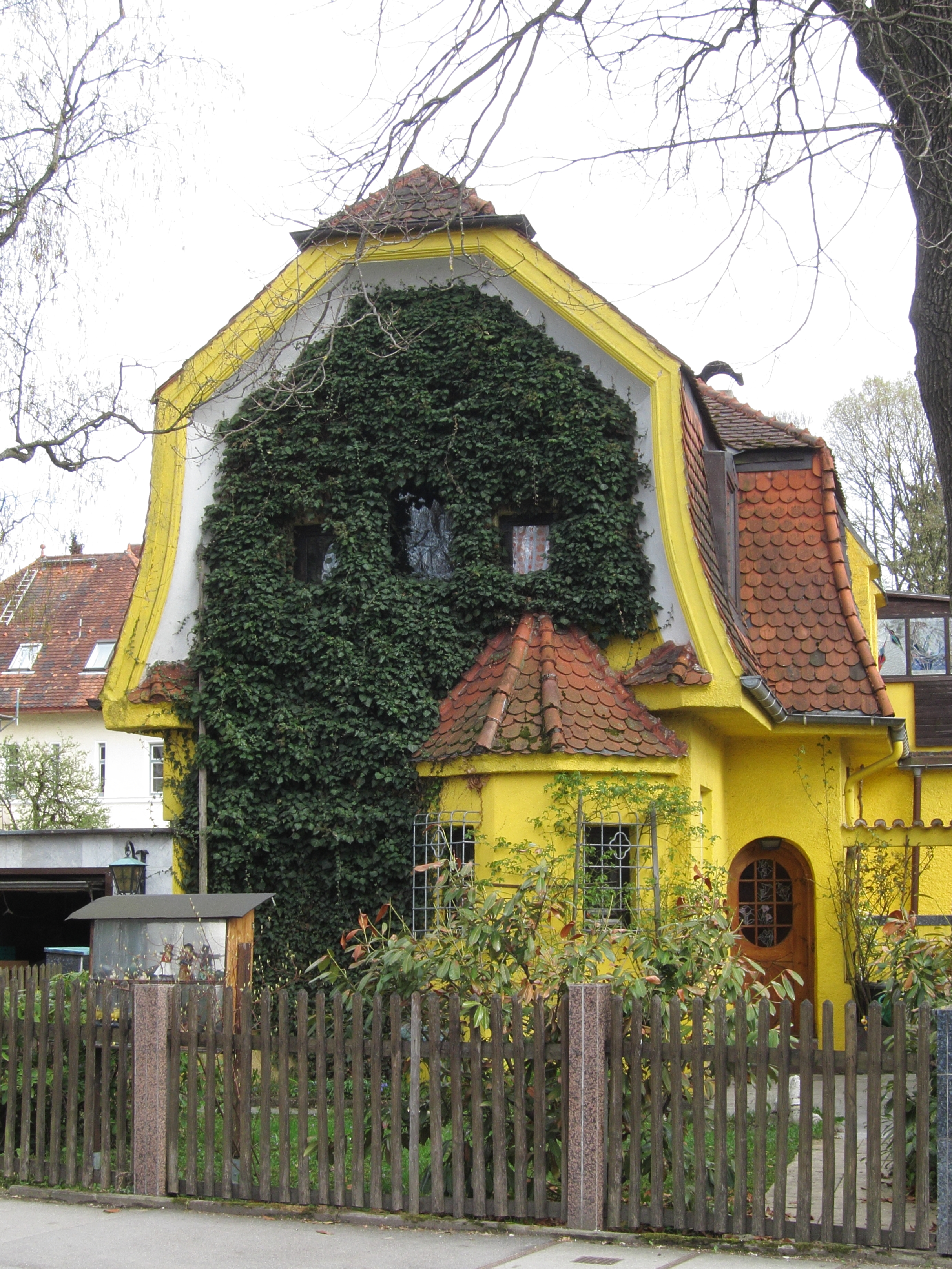 Maria-Eich-Straße 75; Erdgeschossiges Wohnhaus, mit steilem Mansarddach, 1912 von Friedrich Schweisgut; Wohnhaus des Dichters Waldemar Bonsels.